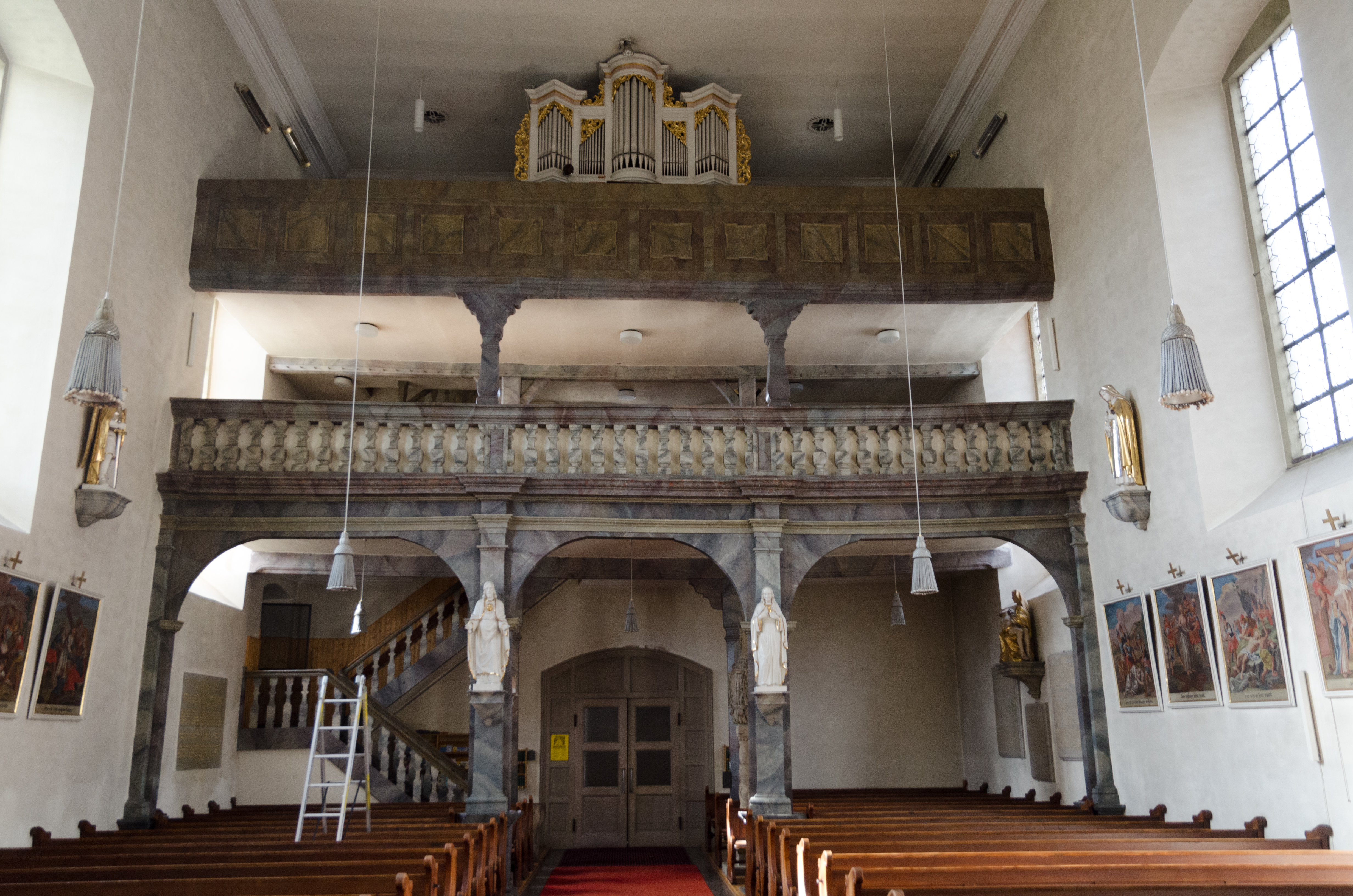 Burkardroth, St. Petrus in Ketten, Interior